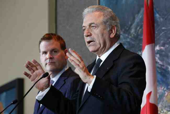 Στο πλαίσιο της επίσκεψης, ο κ. Αβραμόπουλος είχε διμερείς διαβουλεύσεις με τον Υπουργό Εξωτερικών του Καναδά κ. John Baird (Τετάρτη, 27/2).